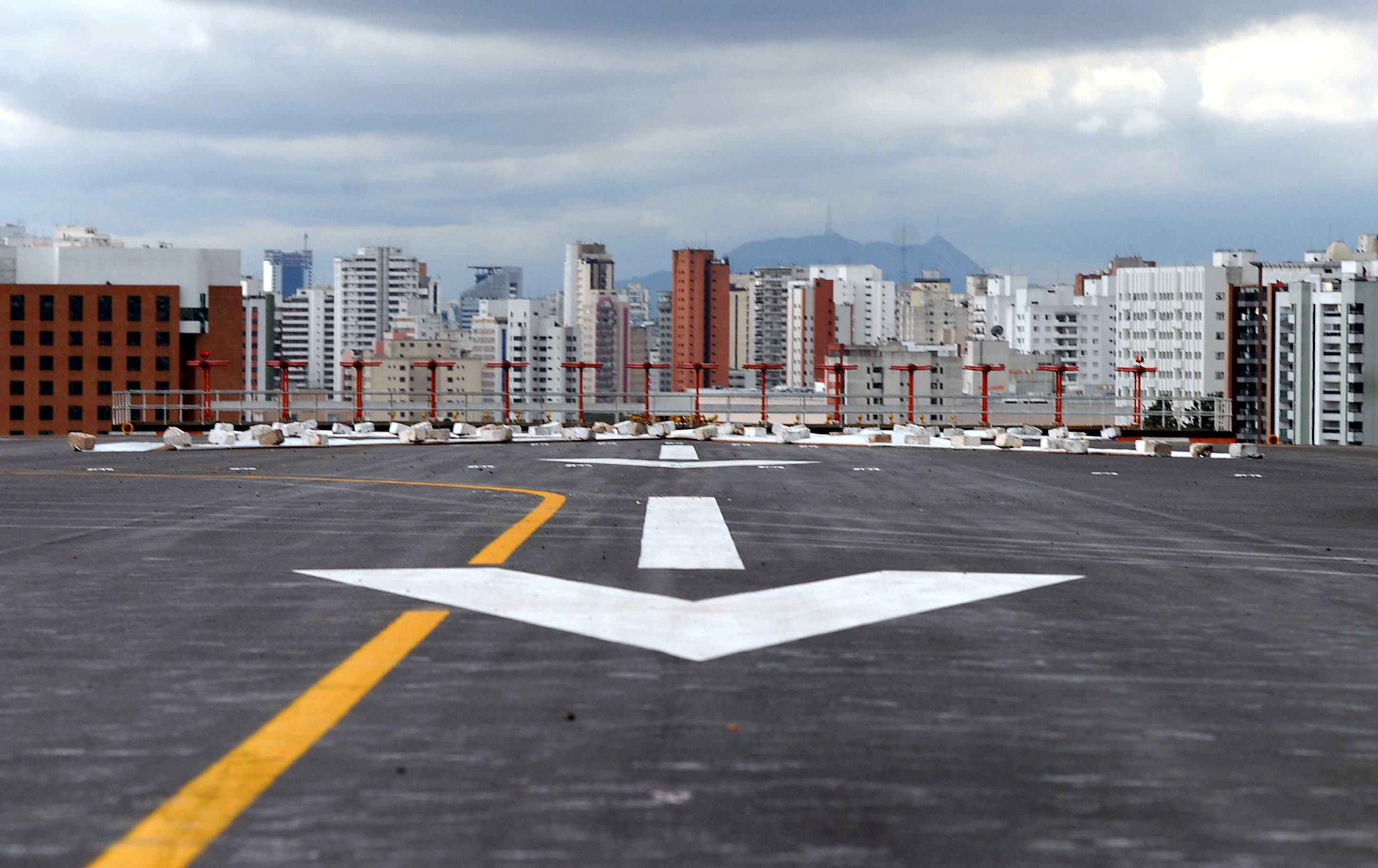 São Paulo - Vista da pista principal do Aeroporto de Congonhas, na qual tentou pousar o Airbus A320 da TAM no acidente do dia 17